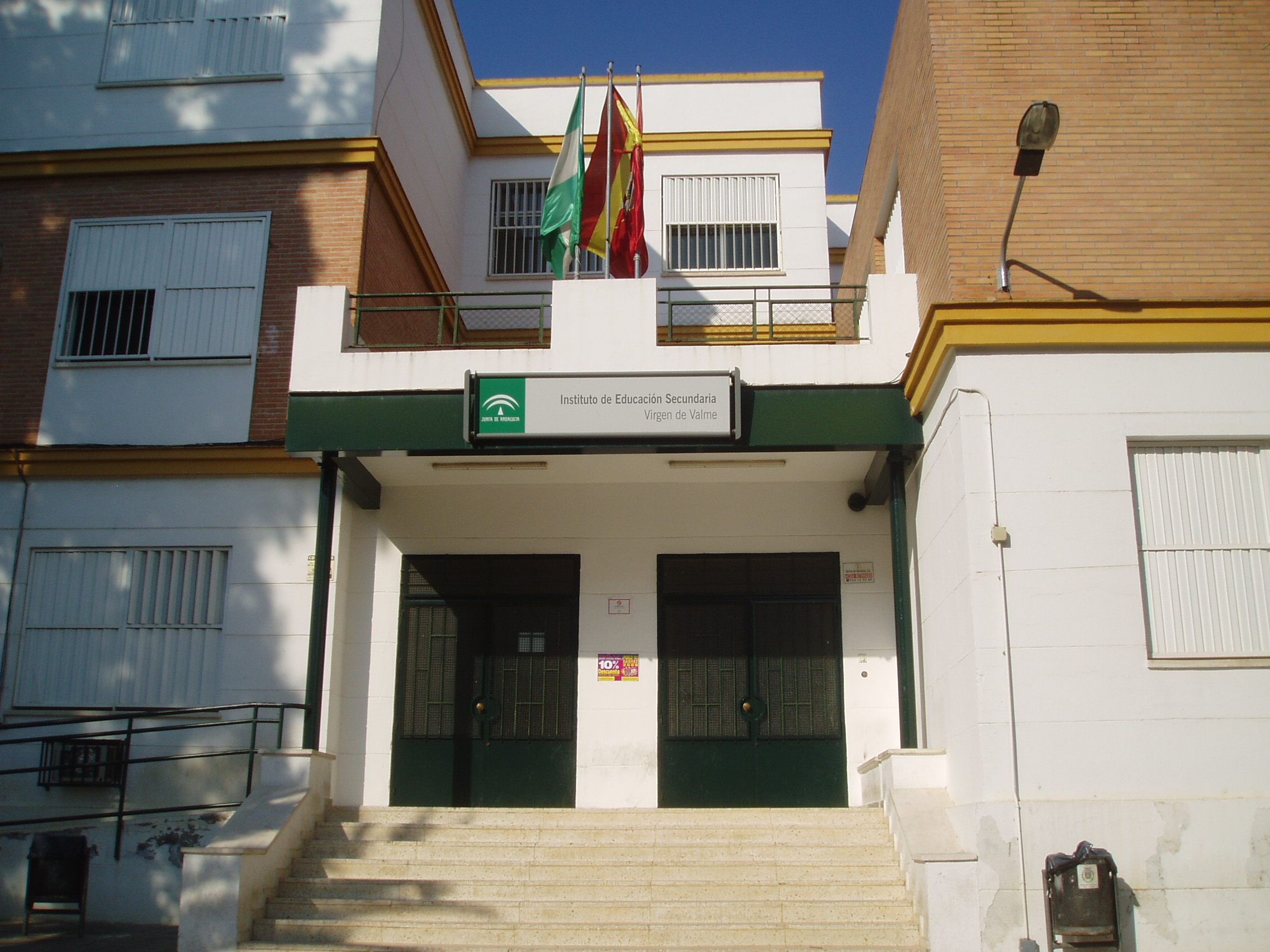 Instituto de Bachillerato "Virgen de Valme", el mas antiguo de Dos Hermanas (Sevilla) España